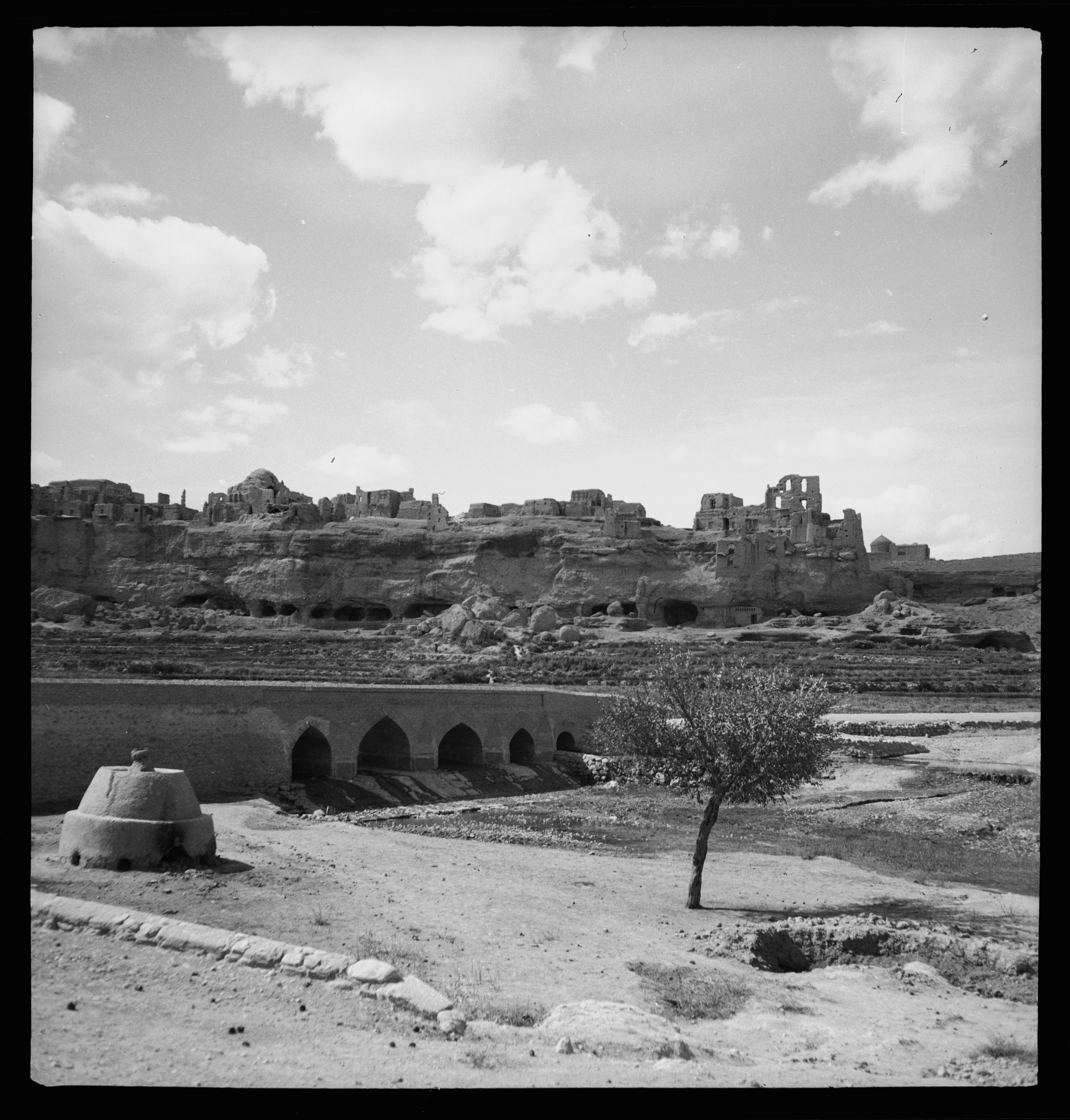 Persien, Jesdegad (Jäz-de-chast, Jesdichast): Siedlung; Alte befestigte Stadt